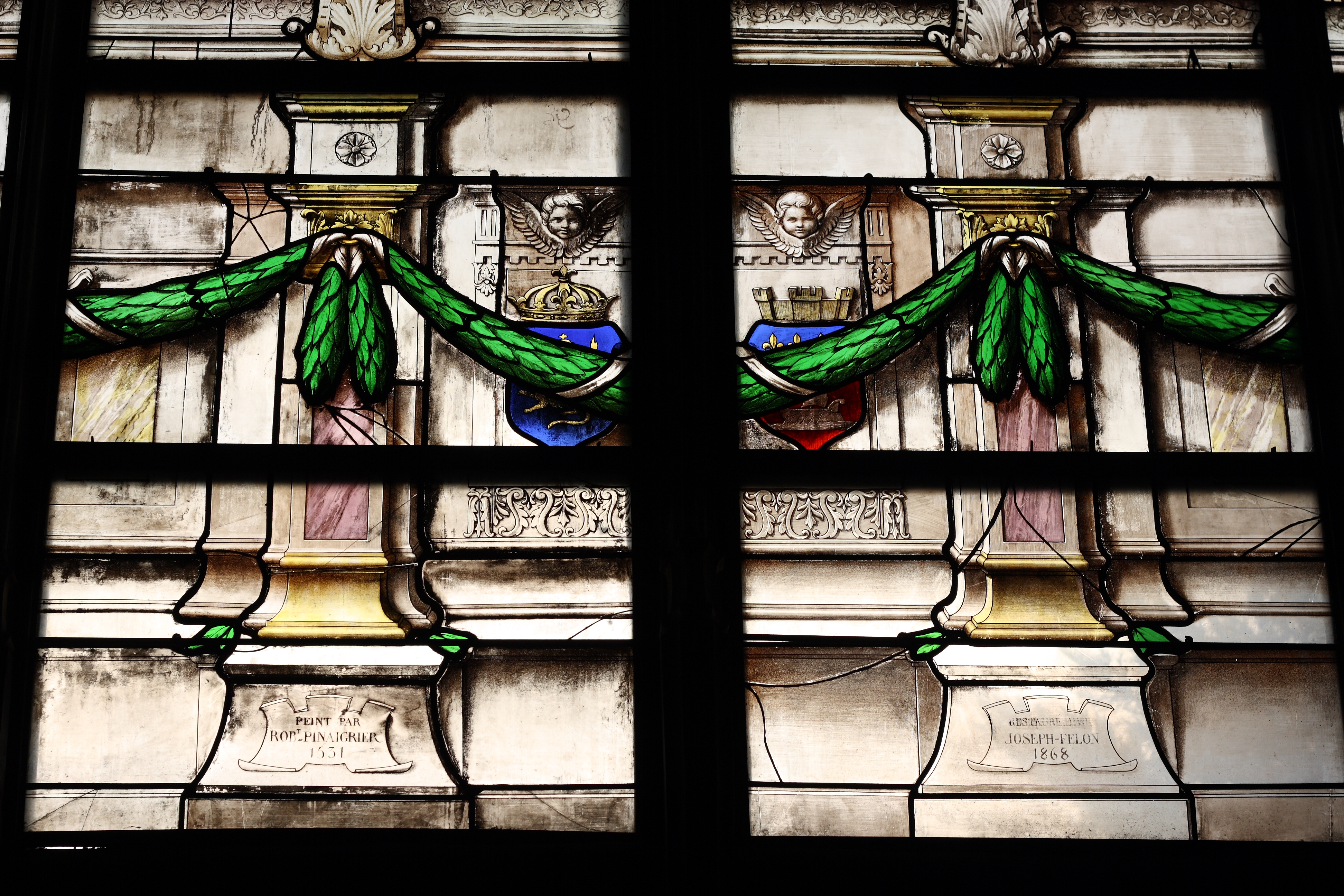 Ausschnitt eines Bleiglasfensters (= Urteil des Salomon, südliches Seitenschiff) in der Kirche St-Gervais-St-Protais in Paris, Darstellung: Signaturen